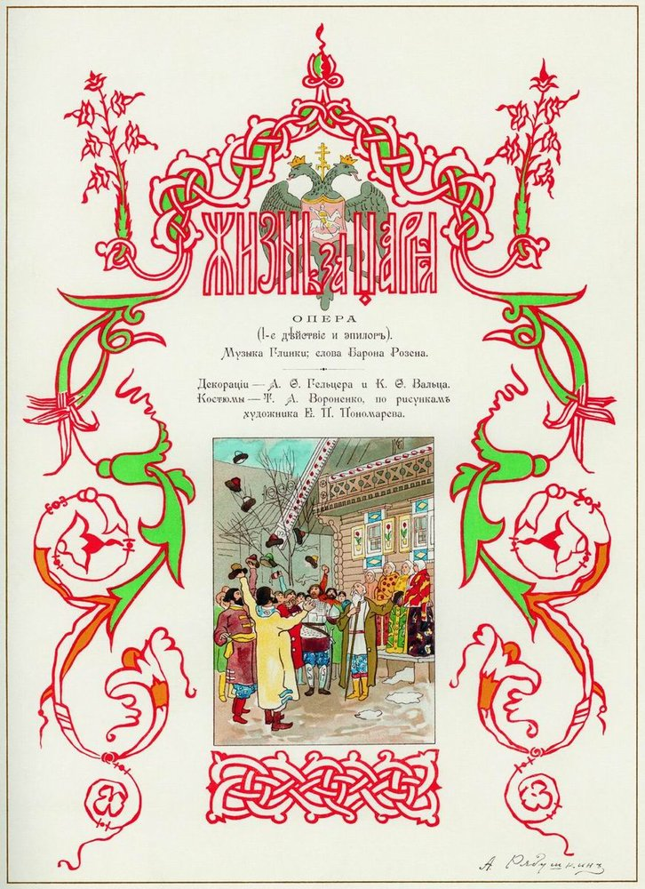 Жизнь за царя. Эскиз плаката